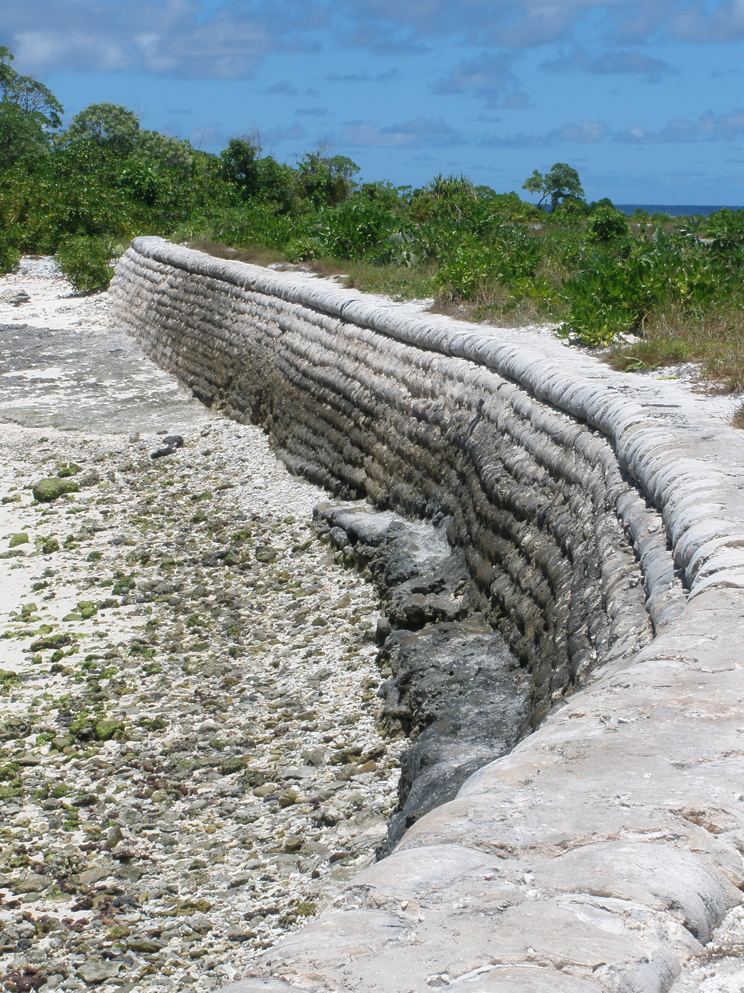 Kiribati 2009.